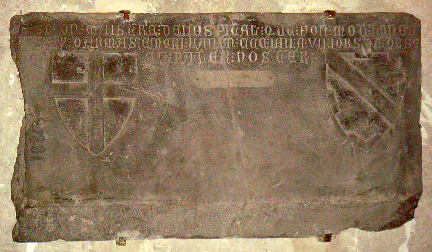 Dieudonne De Gozon Tombstone